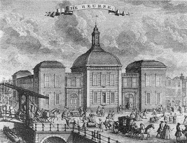 Beurs Rotterdam omstreeks 1840 Exchange, Rotterdam, ca. 1840